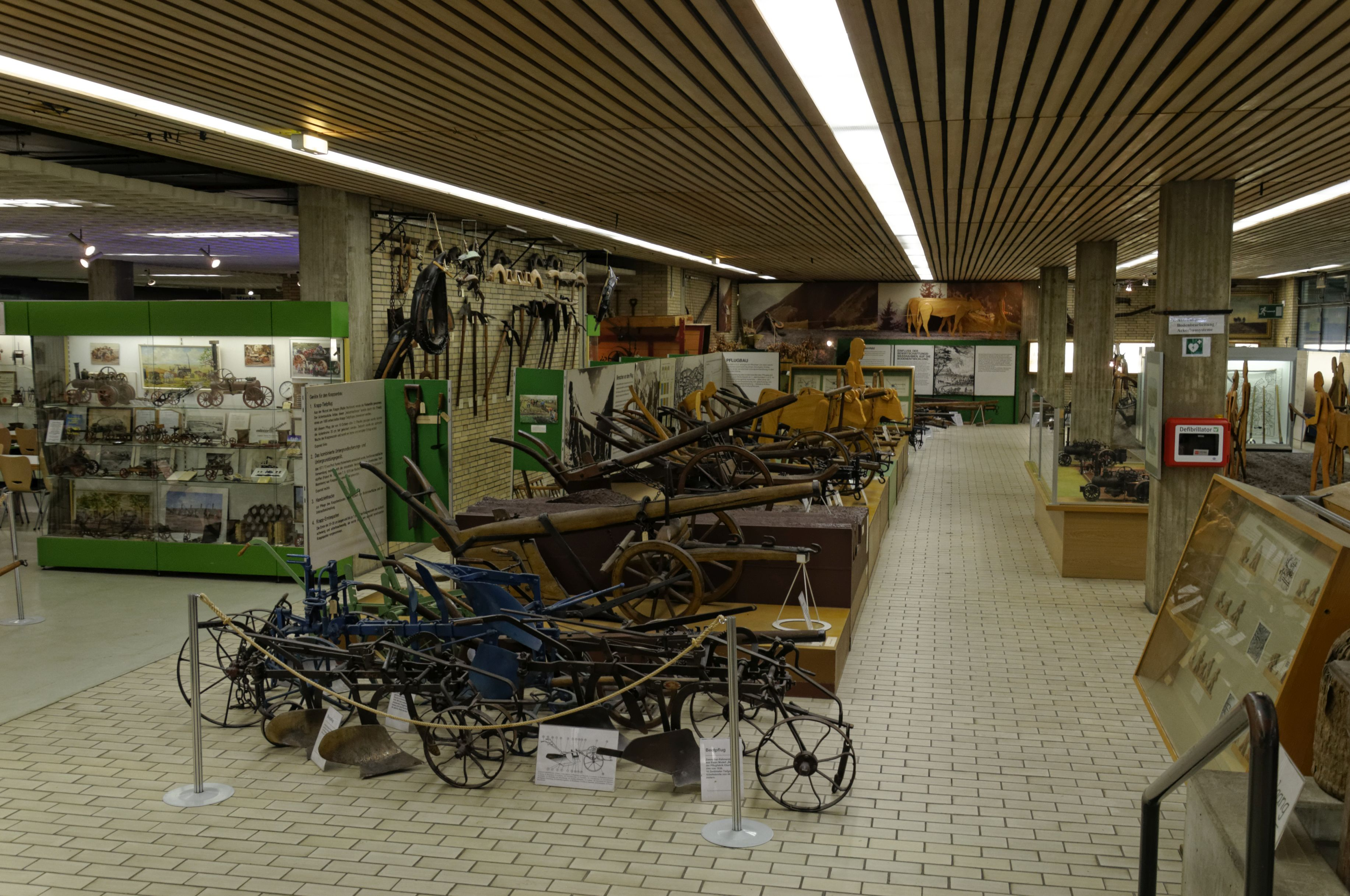 Bilder aus dem Deutsches Landwirtschaftsmuseum in Hohenheim (Stuttgart)